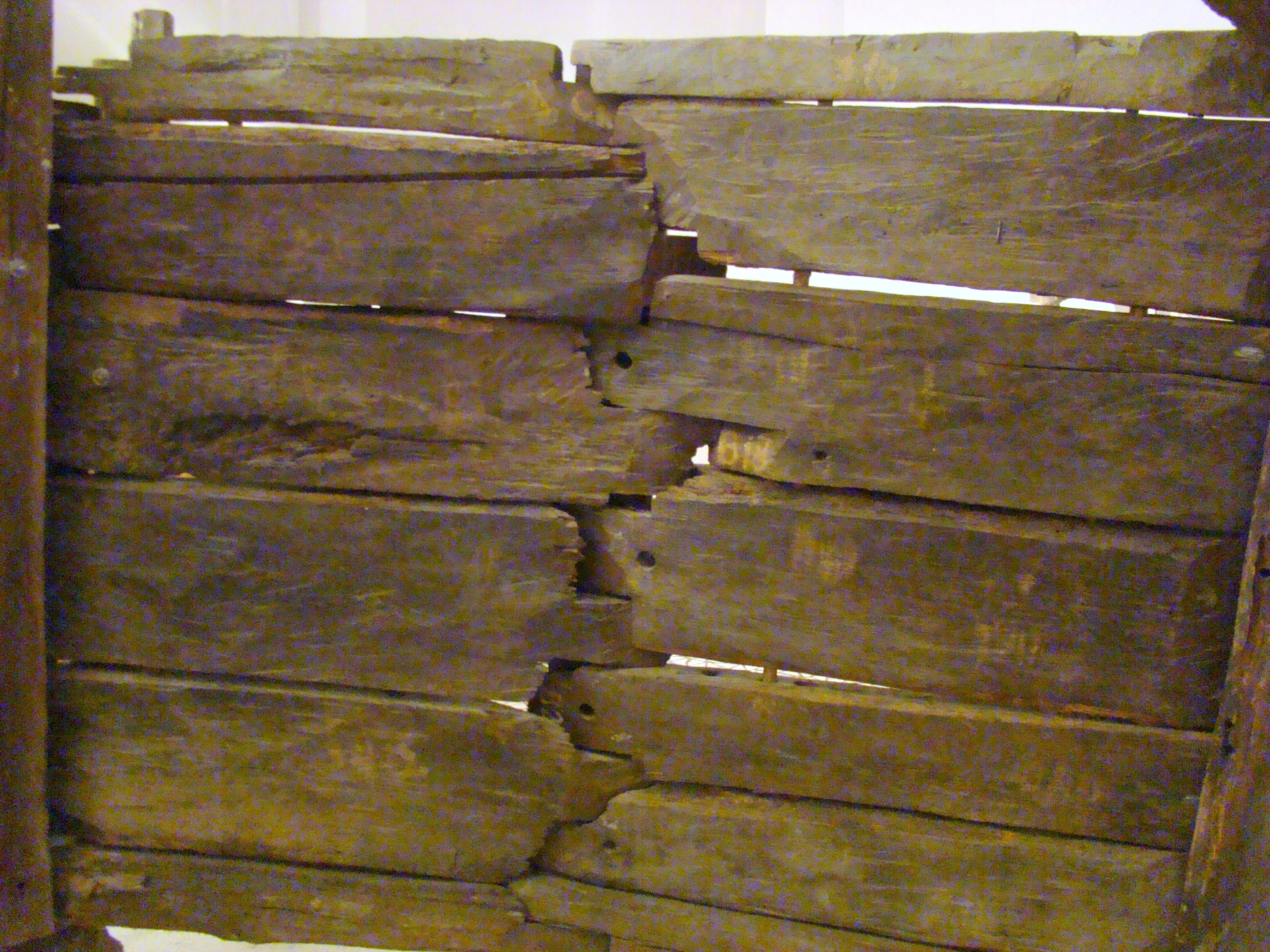 Biserica de lemn din Mintia, Hunedoara, mutată în incinta Muzeului Țăranului Român din București